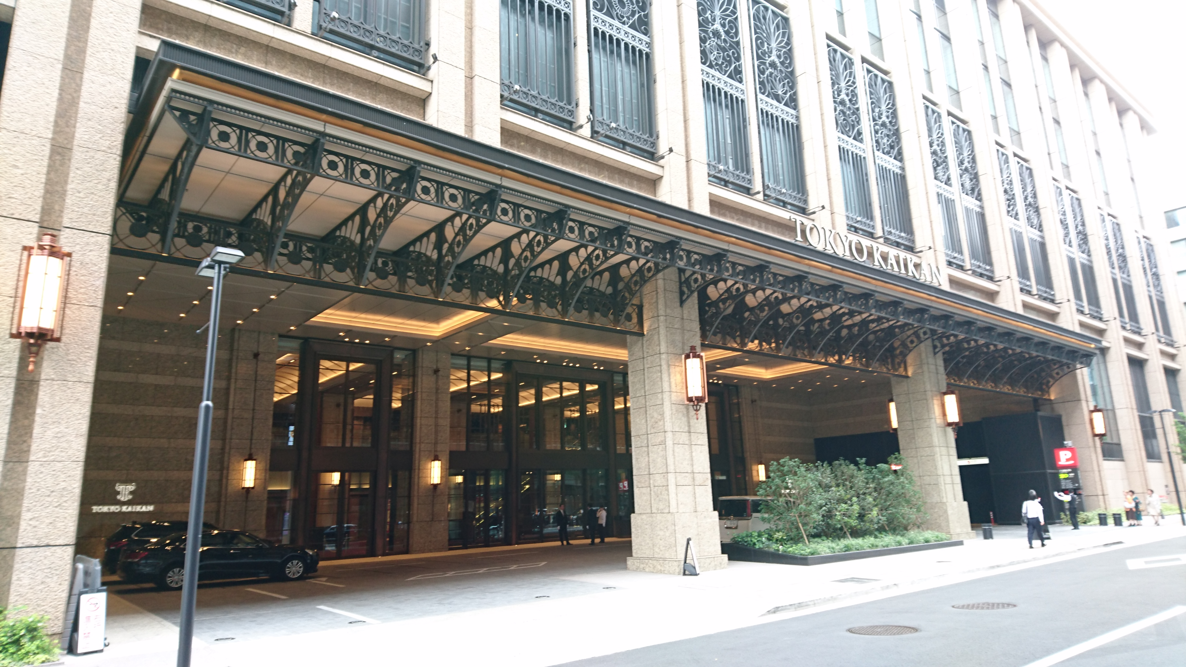 丸の内二重橋ビル1階に入居する東京會舘のエントランス